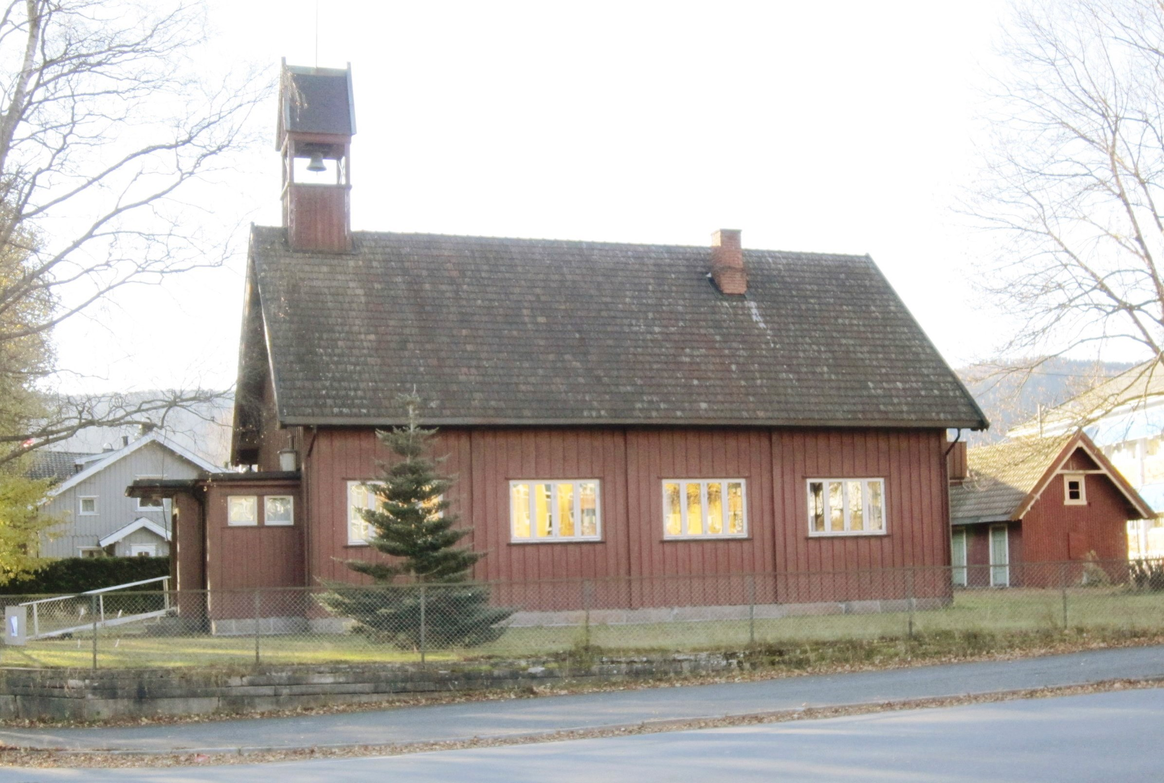 Solberg kapell (tidligere Fredtun kapell) på Solbergelva i Nedre Eiker